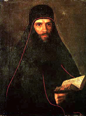 Старообрядческий архиепископ Московский и всея Руси Антоний (Шутов). Неизвестный художник, 1858 г. ГИМ